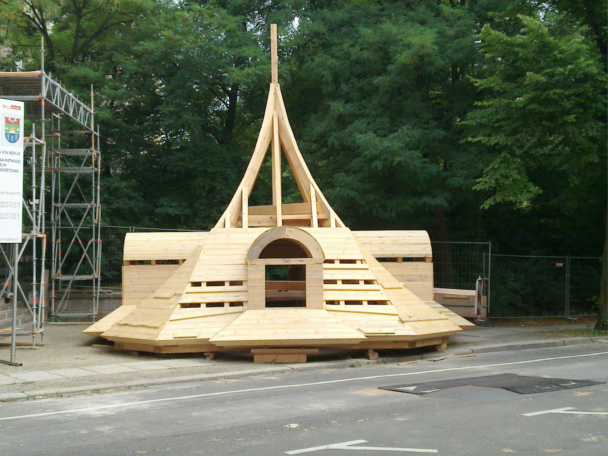 Berlin-Lichtenberg, eh. Cecilien-Lyzeum, Restaurierungsarbeiten - neuer Dachstuhl